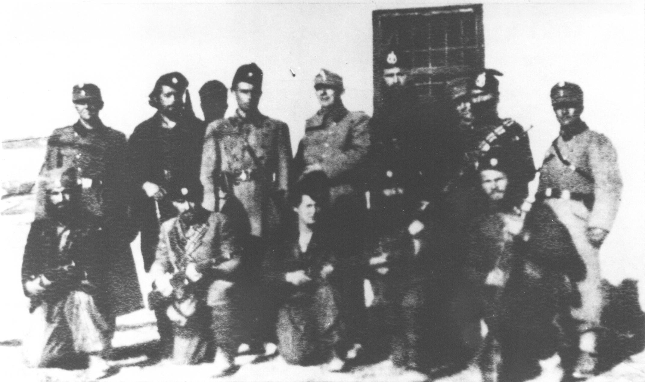 Srpskohrvatski / српскохрватски: Grupa nemačkih vojnika i četnika D. Mihailovića u vreme proboja u Srbiju 2.proleterske i 5.krajiške divizije NOVJ u proleće 1944.